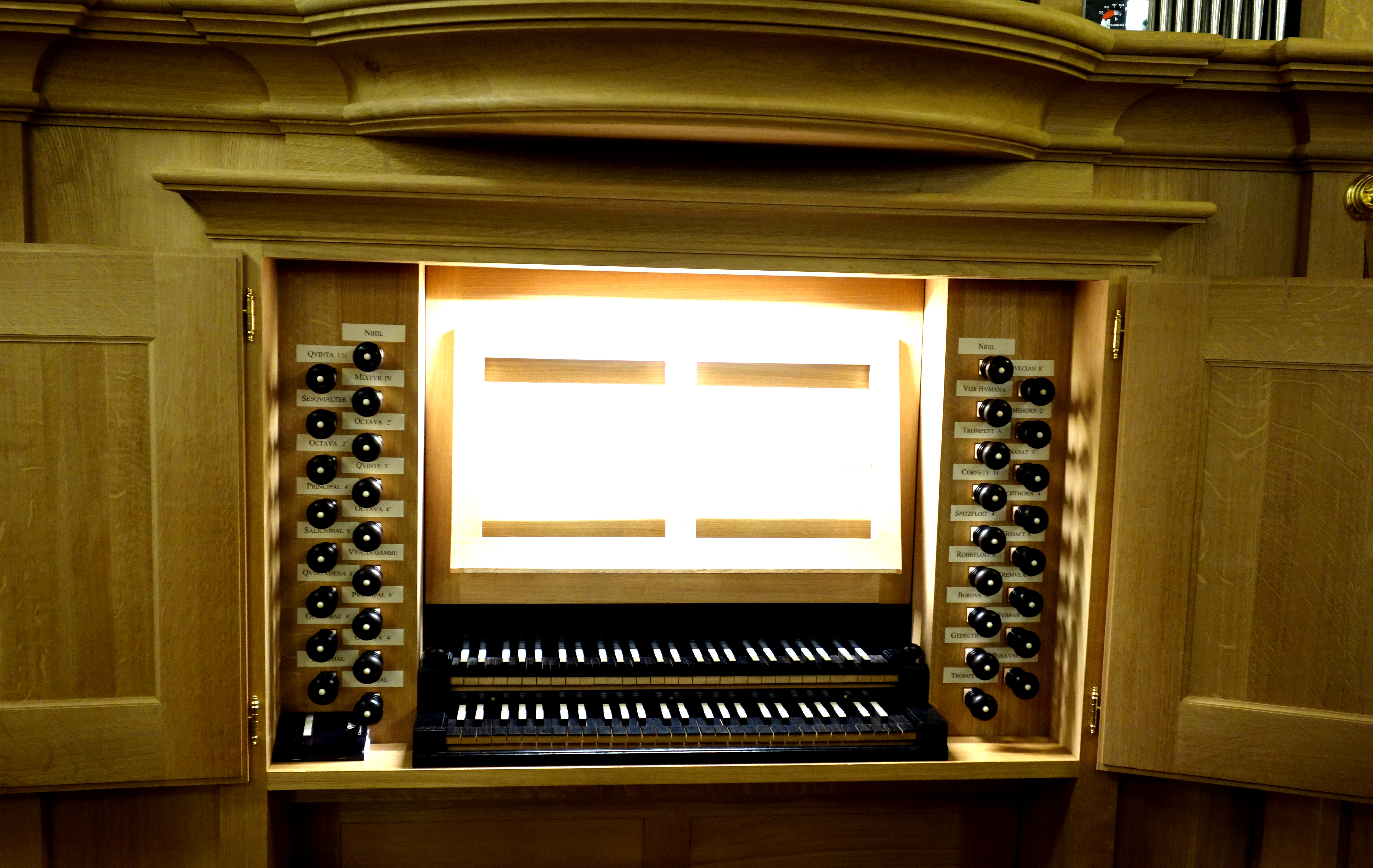 Spielschrank der West-Orgel der Musikhochschule München